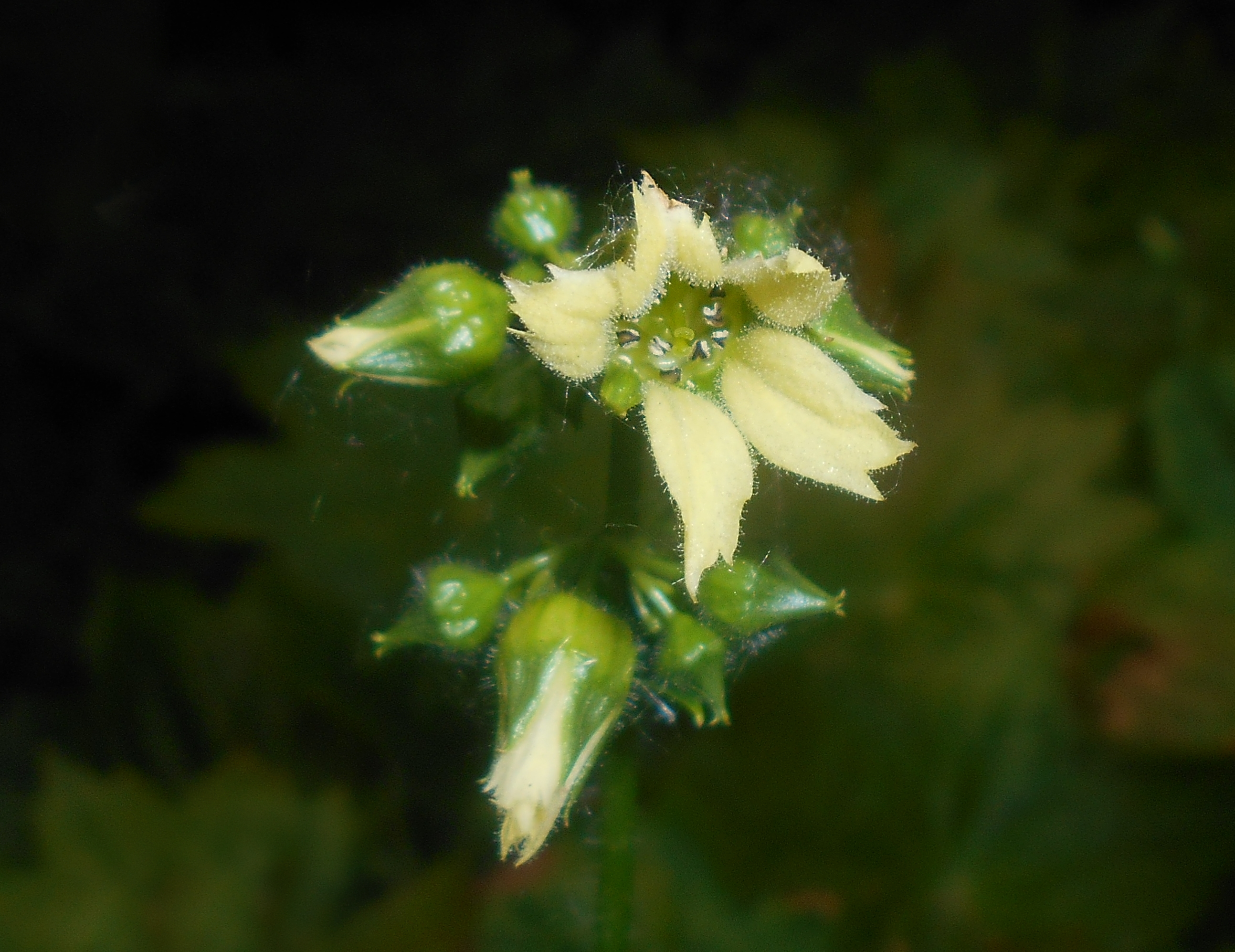 Peltoboykinia tellimoides, Ogród Botaniczny UMCS w Lublinie.